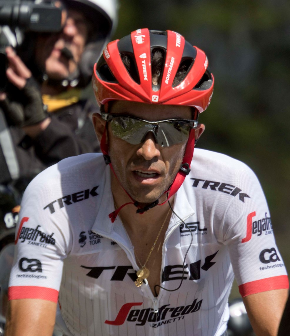 14-7_2 contador